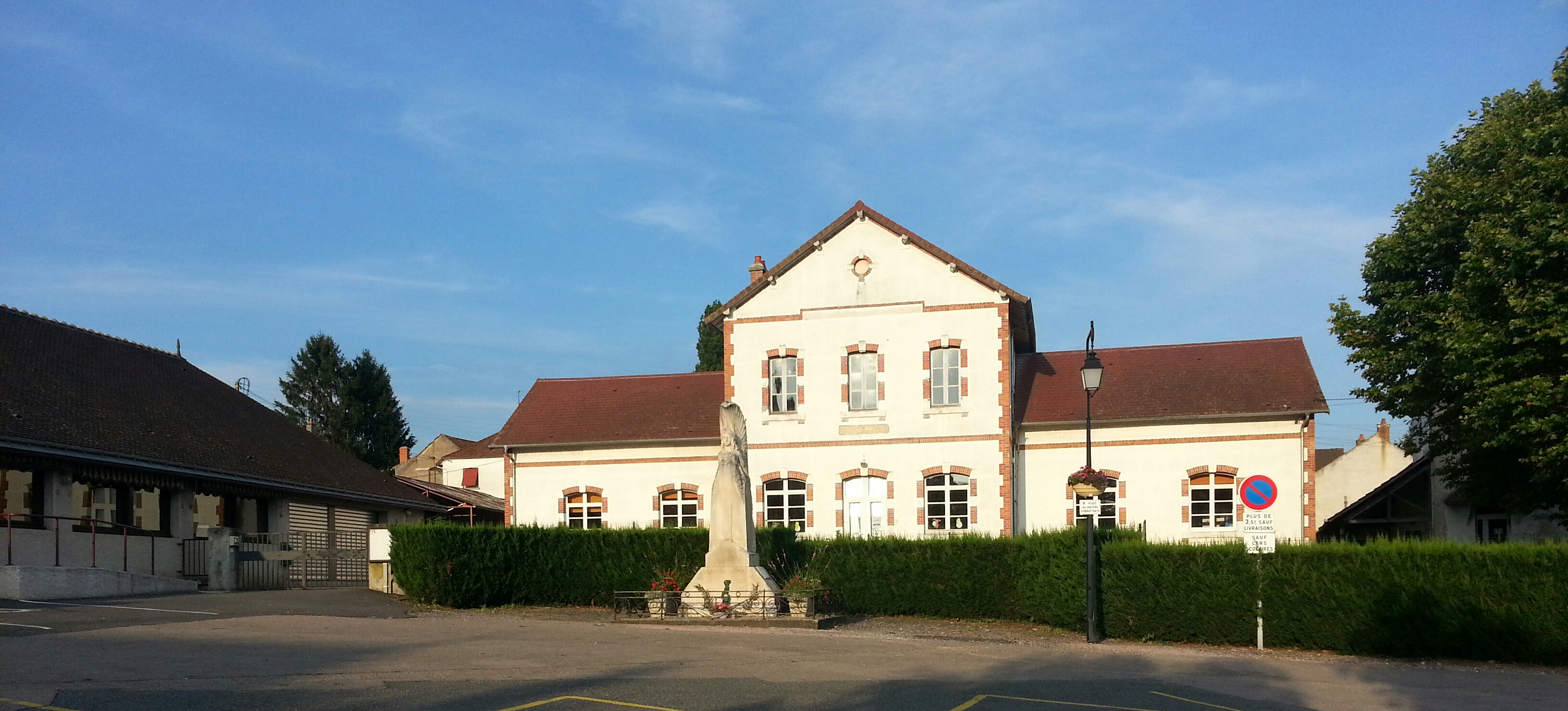 École de Billy dans l'Allier, France